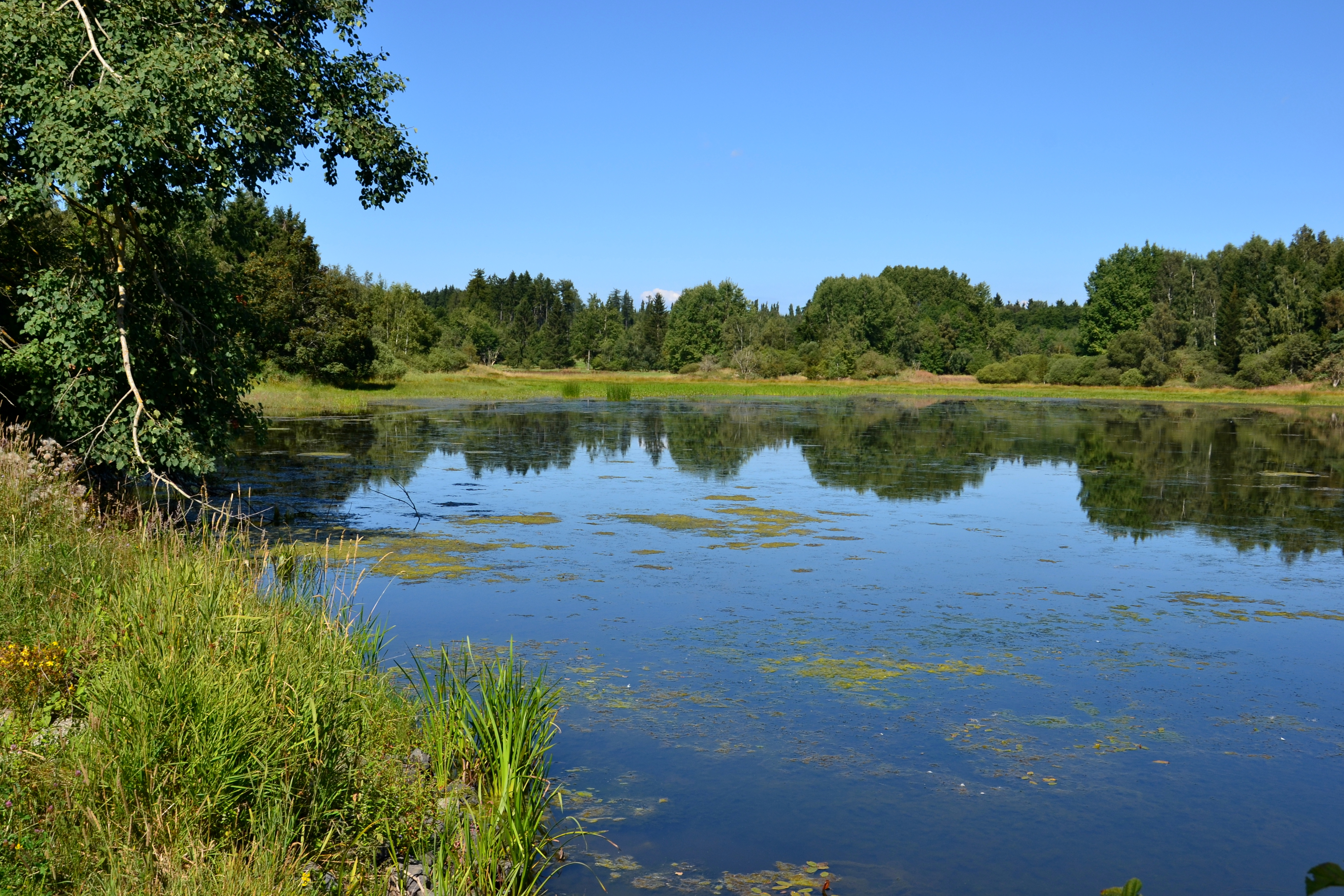 Velký údrčský rybník